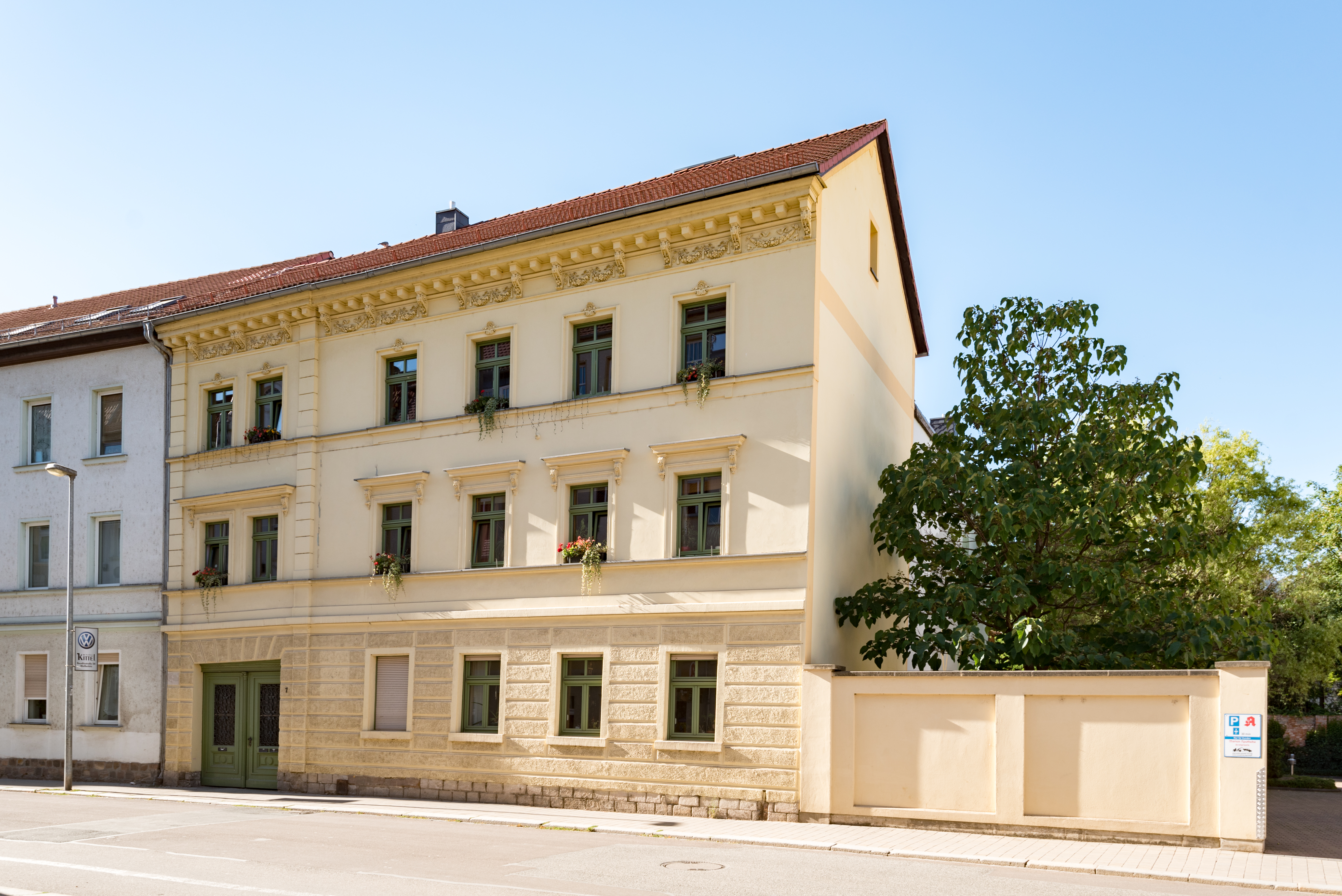 Weißenfels, Beuditzstraße 7